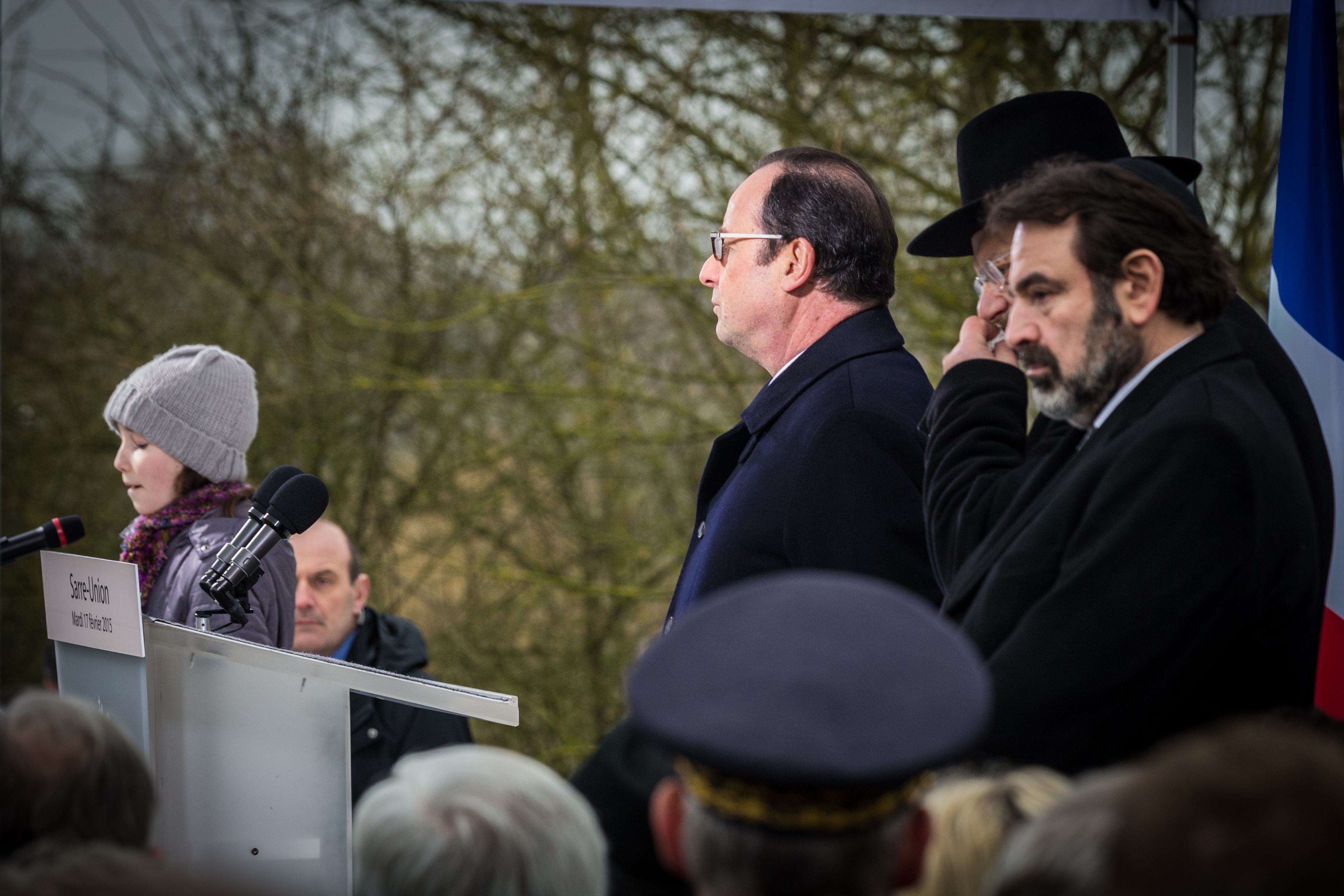 Une écolière de CM1 lit la préface de « Si c'est un homme » de Primo Levi avant les allocutions.